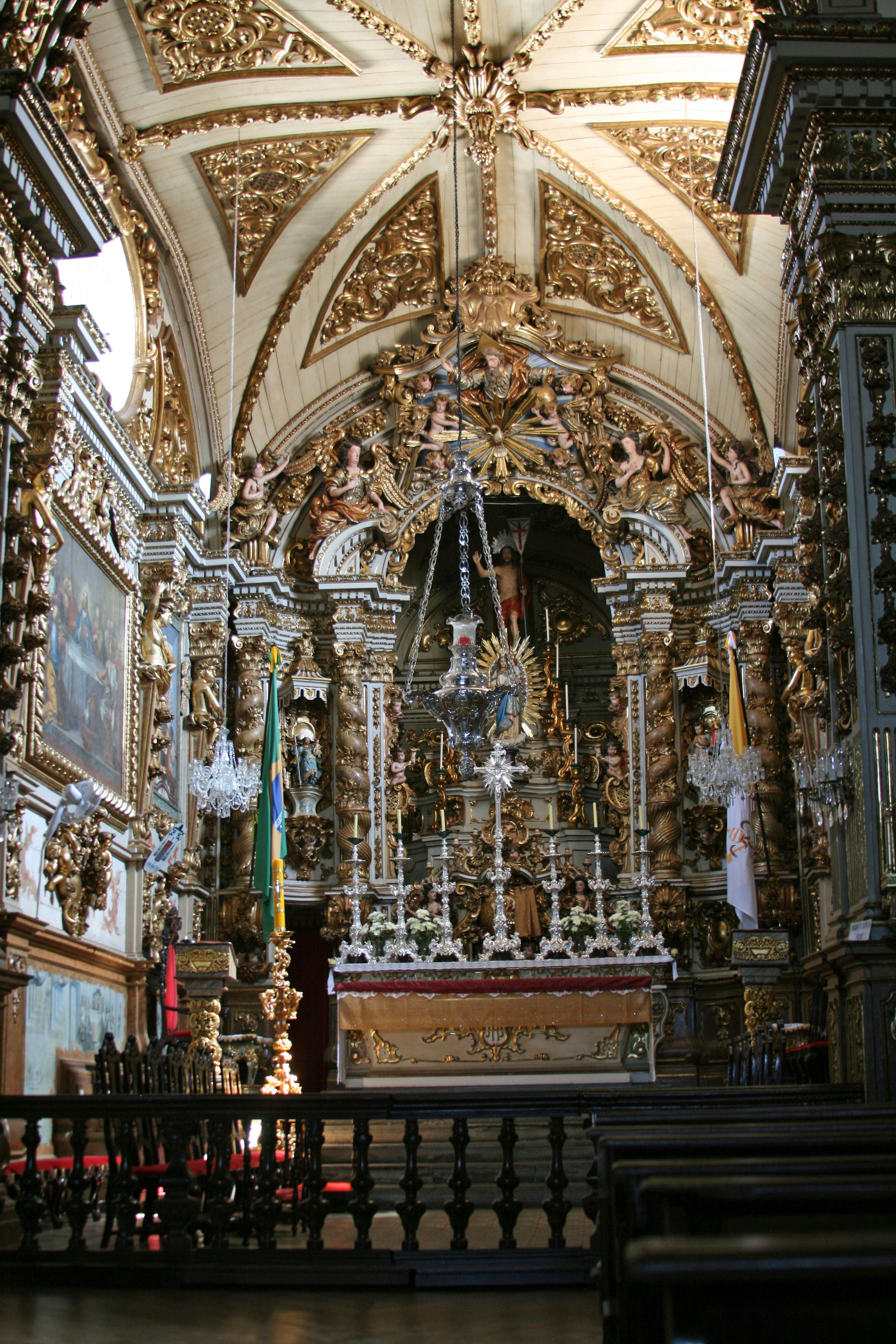 Igreja Matriz de Nossa Senhora do Pilar de São João del-Rei, Minas Gerais.